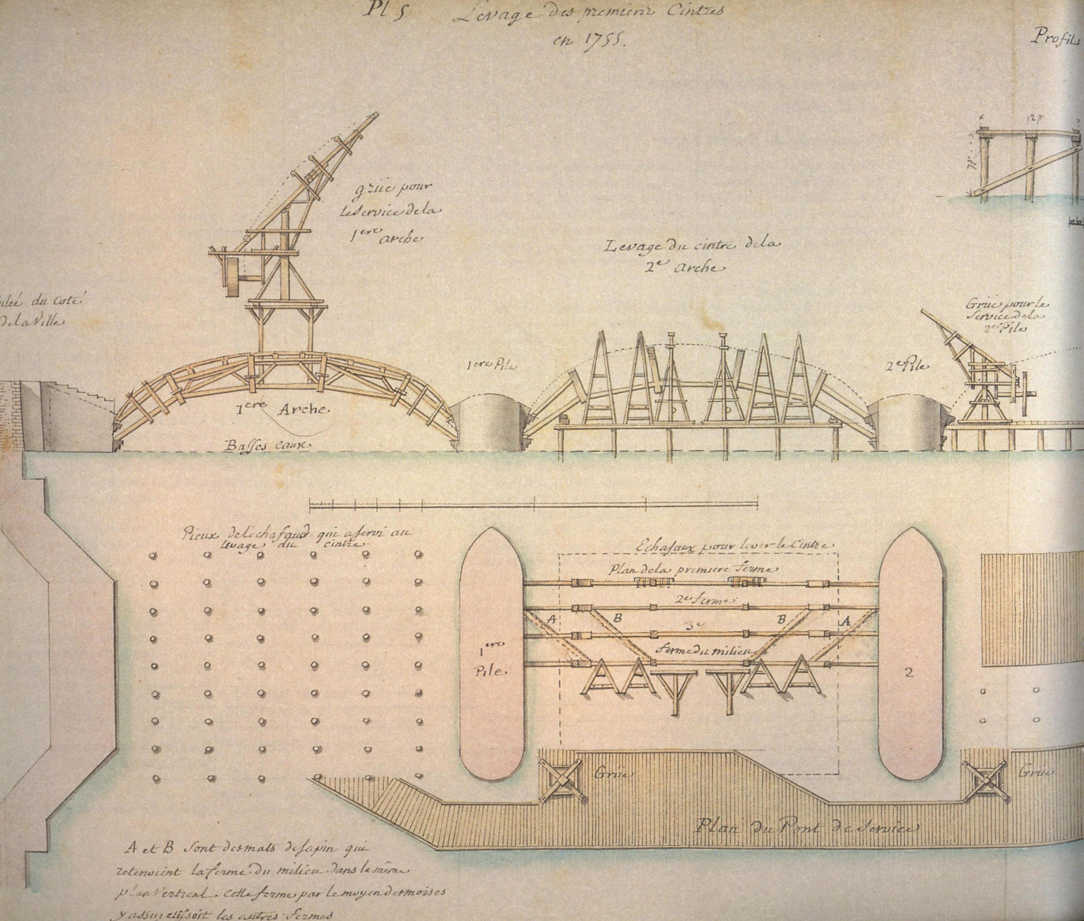 Pont George V, Levage des premiers cintres des arches 1 et 2 en 1755, Orléans, Loiret, France